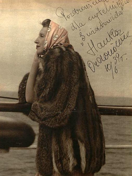 Hanka Ordonówna nad Morzem Bałtyckim (1939)